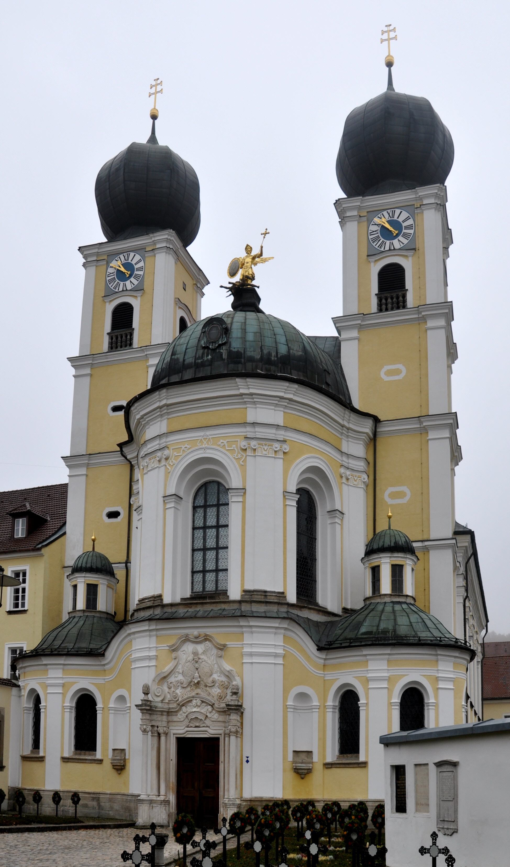 Klosterkirche Metten Fassade